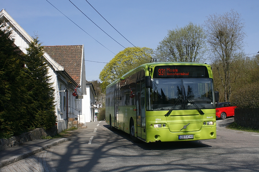 Bussen til Moss passerer Rammemakeriet i Son